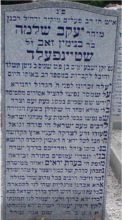 Tombstone of Julius Steinfeld